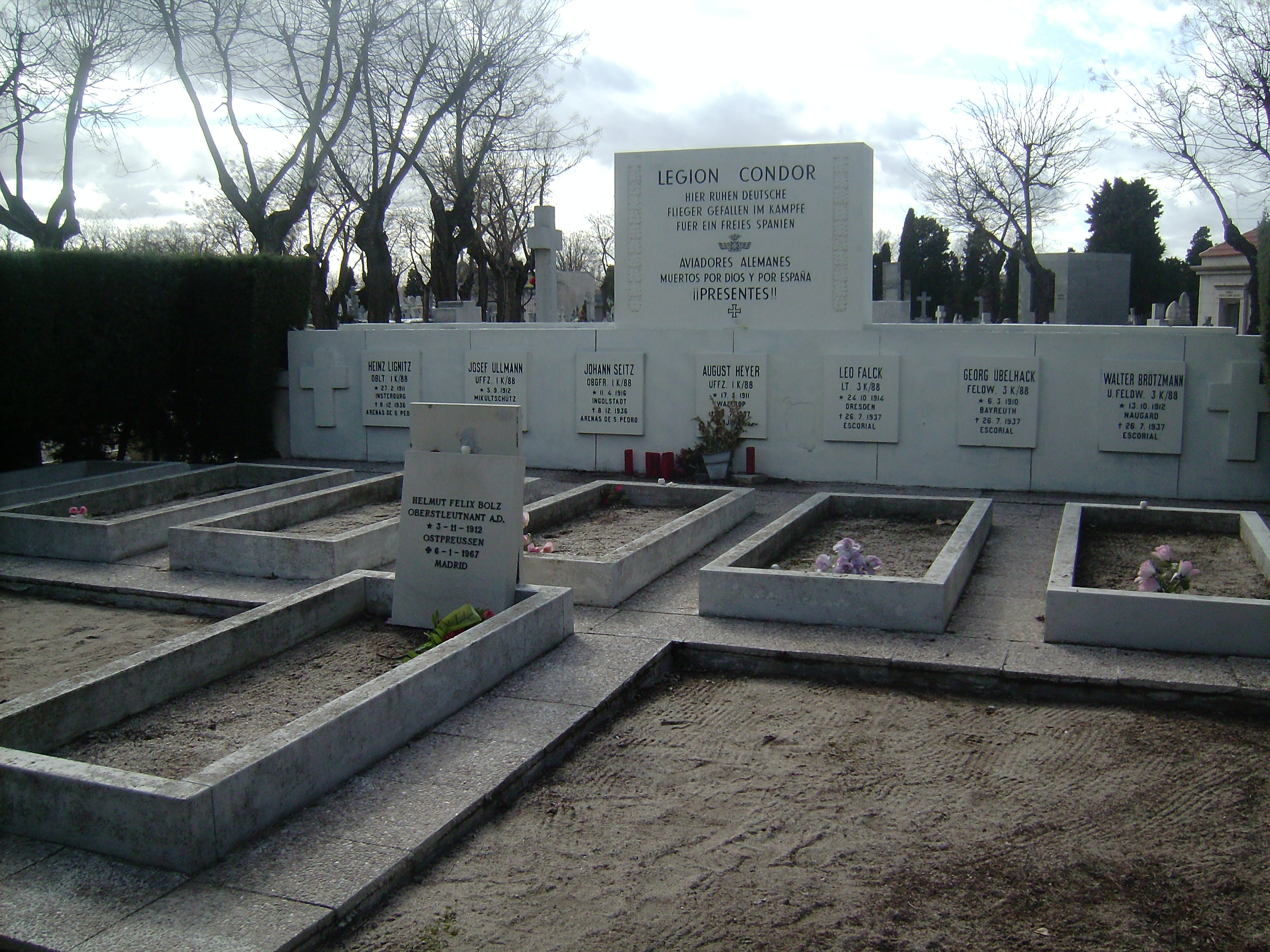 Tumbas de soldados da Lexión Cóndor no cemiterio da Almudena de Madrid